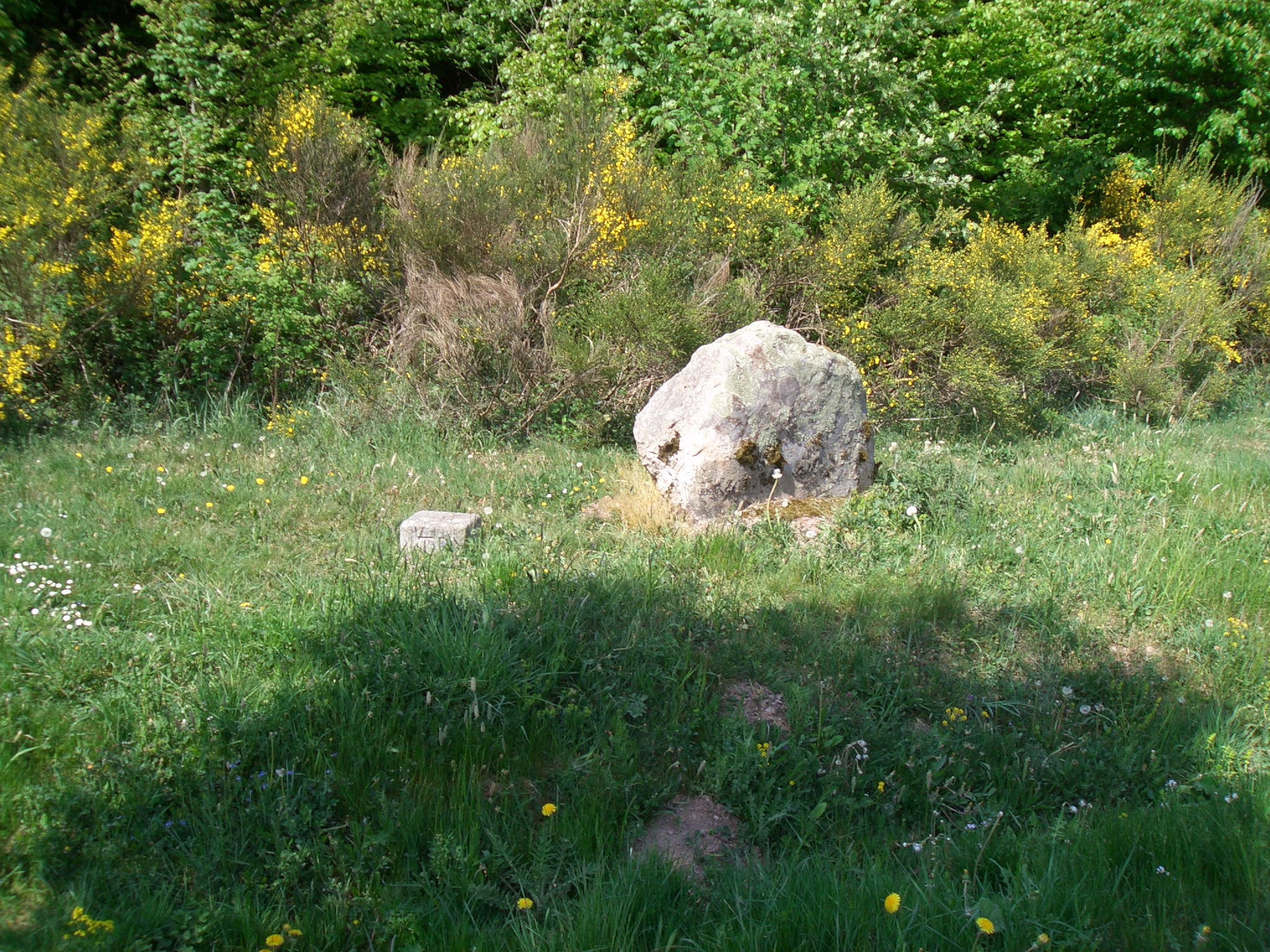 Trigonometrischer Punkt am Parkplatz „Weißer Stein“, Höhe 689,4 Meter – dieser Felsen ist nicht der „Weiße Stein“!